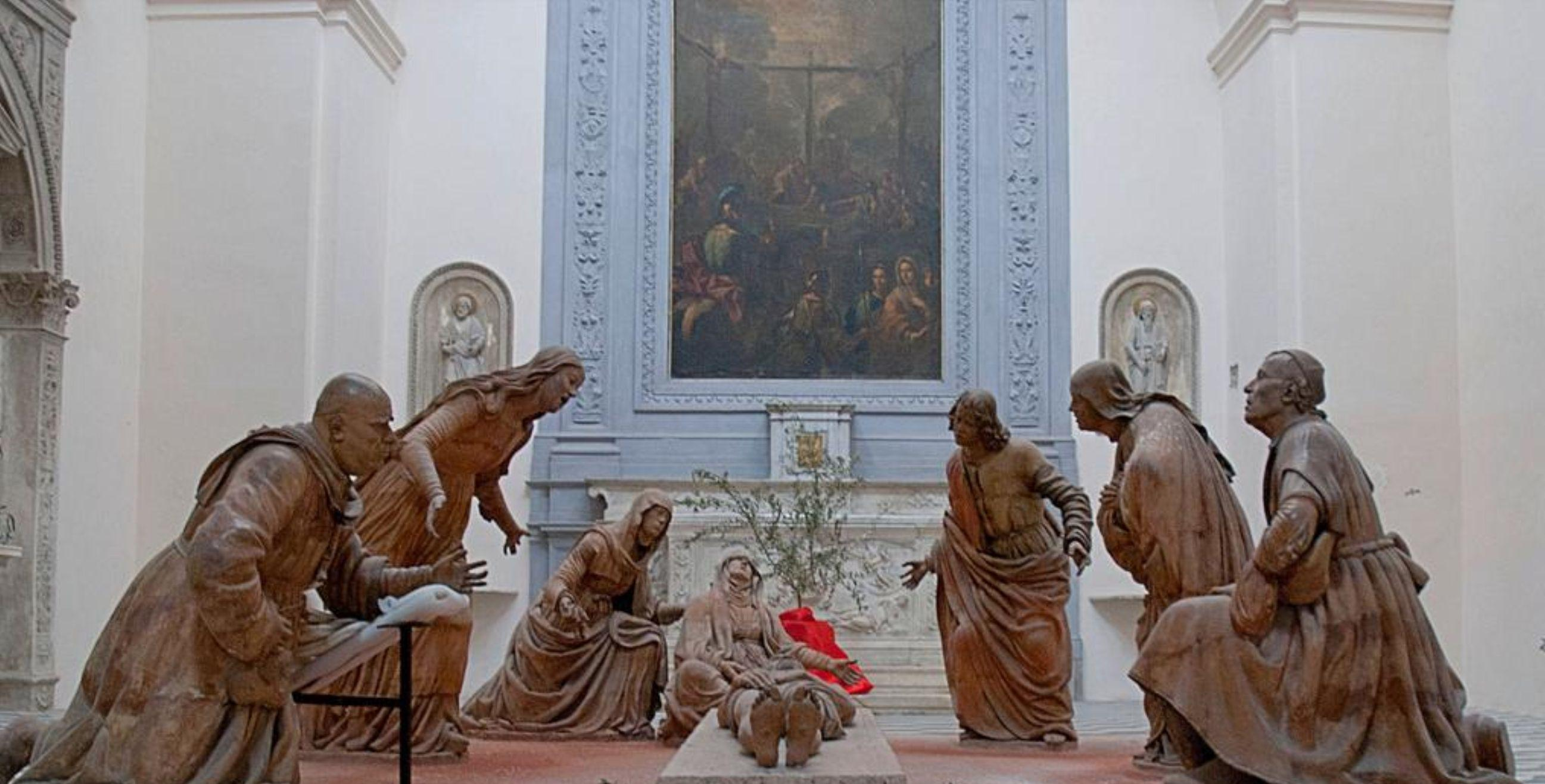 Opera scultorea di Guido Mazzoni presso la Chiesa di Sant'Anna dei Lombardi (Napoli). Compianto sul Cristo morto (1492)